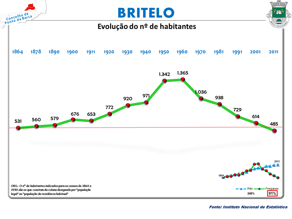 Censos 1864/2011